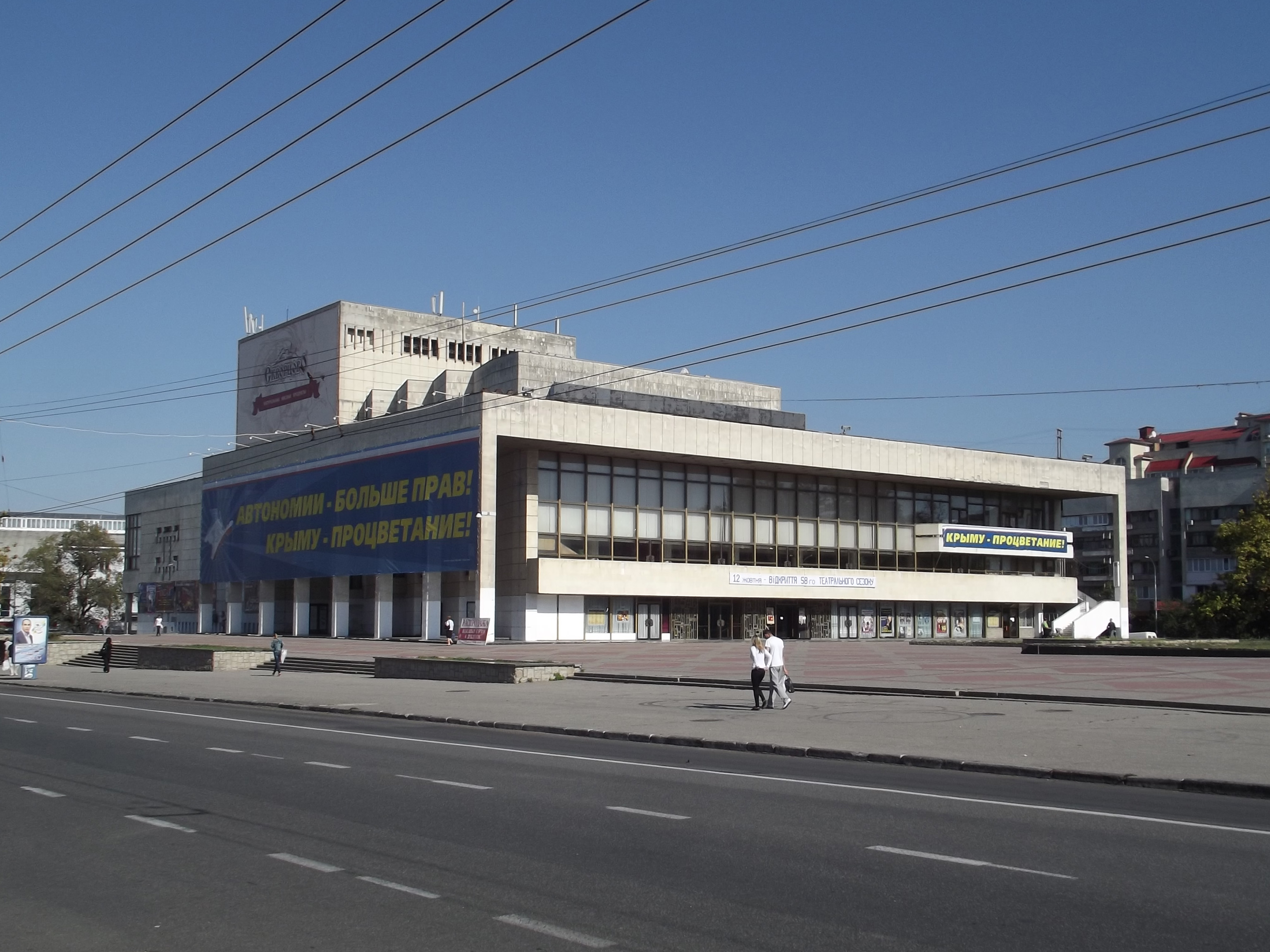 Украинский театр драмы и музыкальной комедии